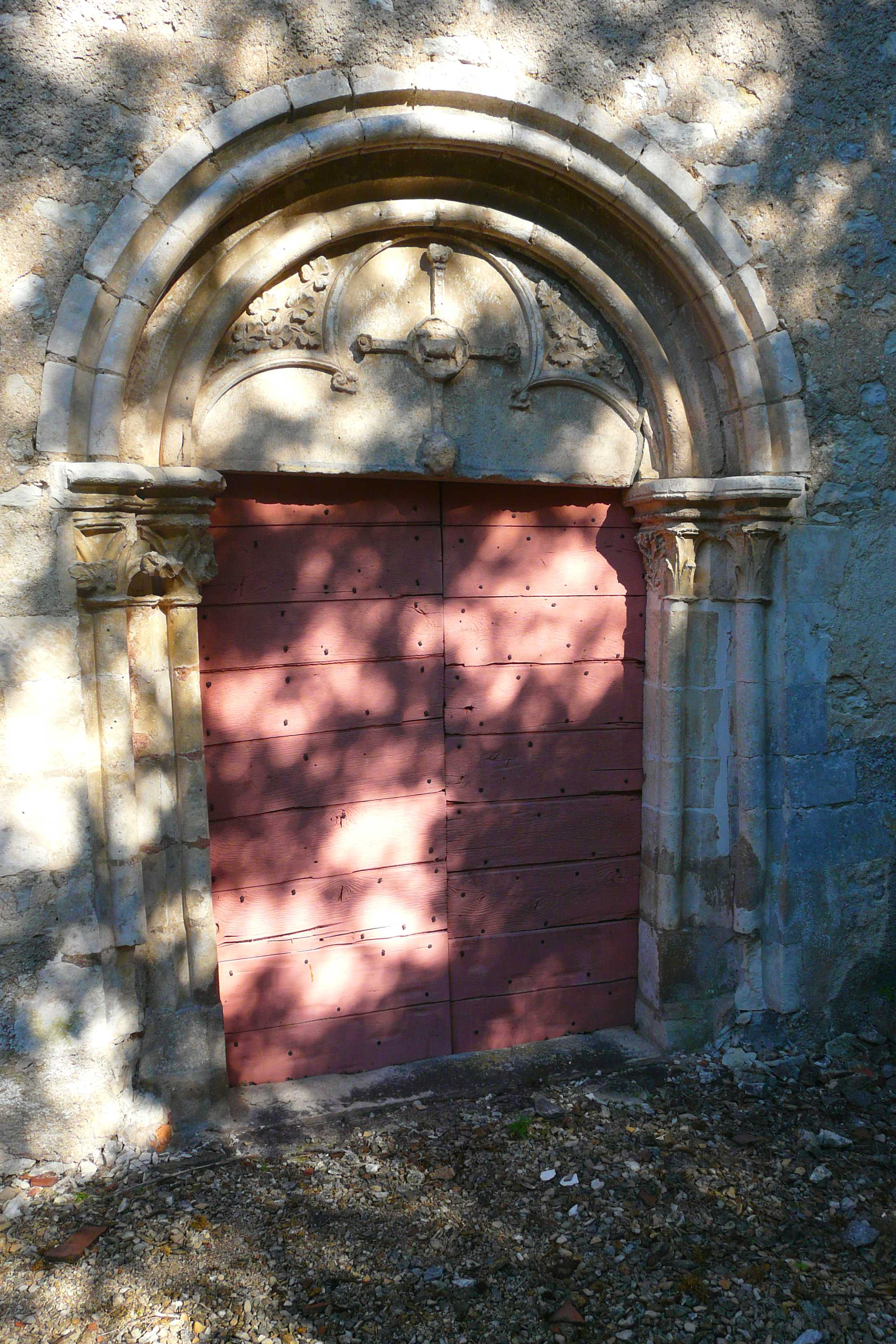 Église de La Chapelle-Vaupelteigne (Inscrit) .